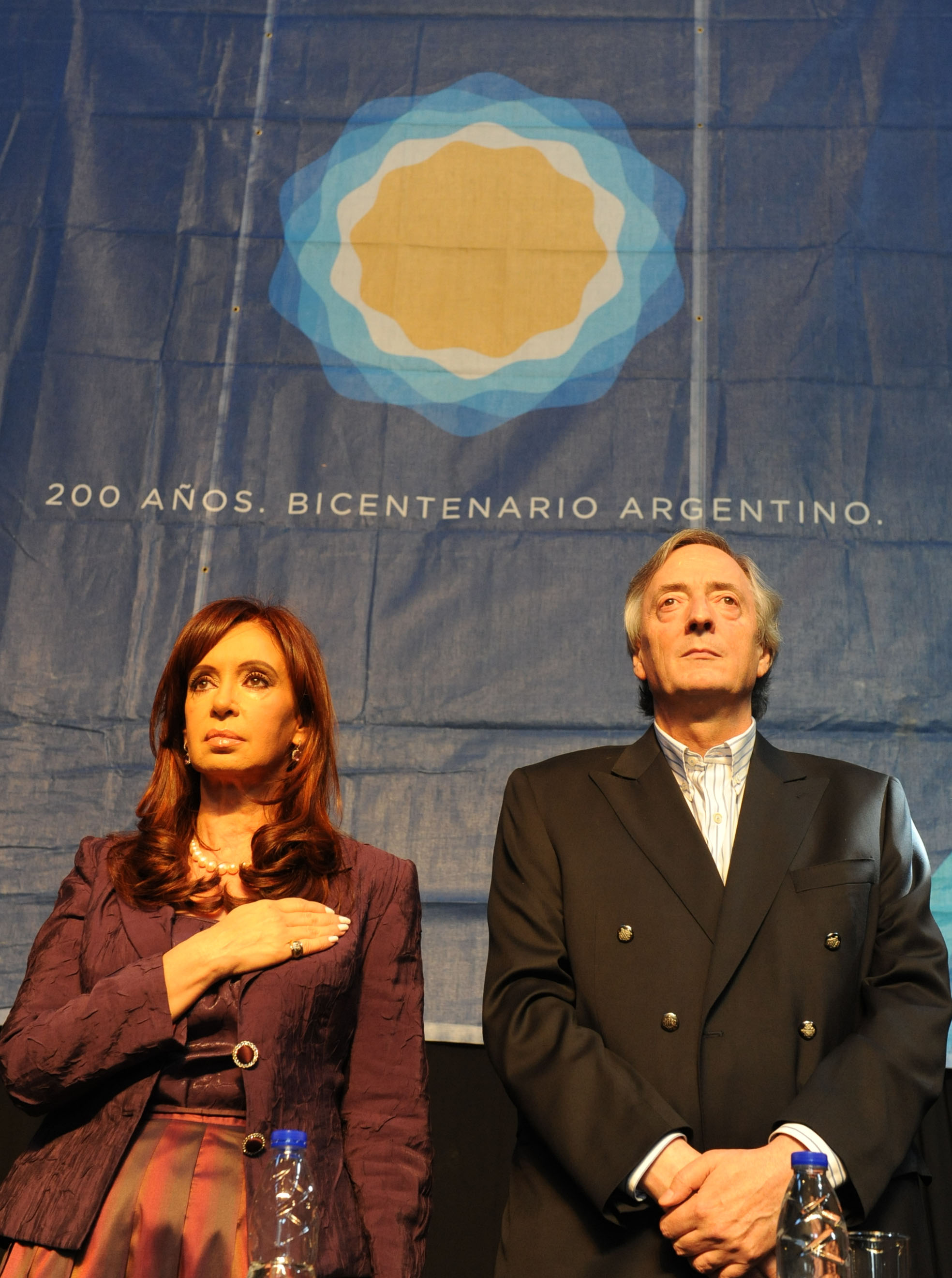 Cristina Fernández de Kirchner, acto en la ESMA por el día de la memoria